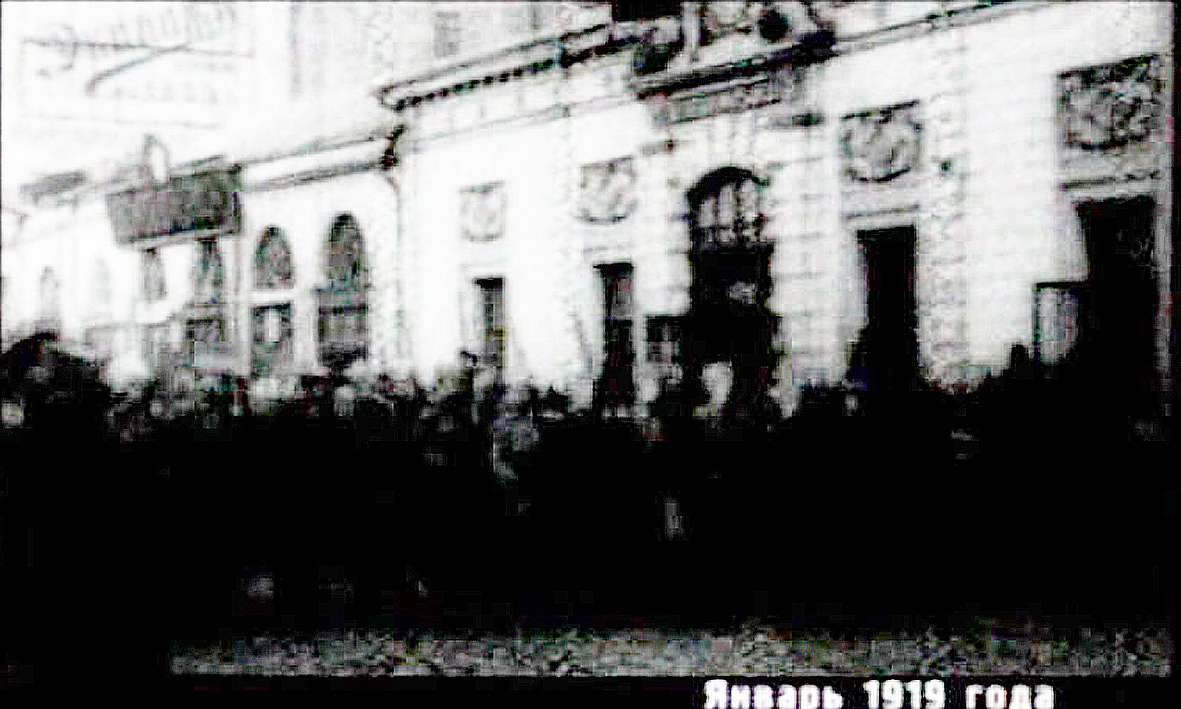 Беларуская (тарашкевіца): Чырвоная Армія ў Вільні. 6 студзеня 1919